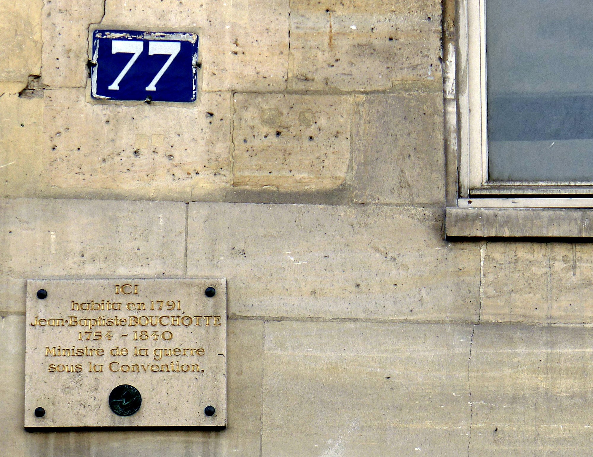 Hôtel de Vic (Inscrit) - n°77 rue du Temple - Paris III .